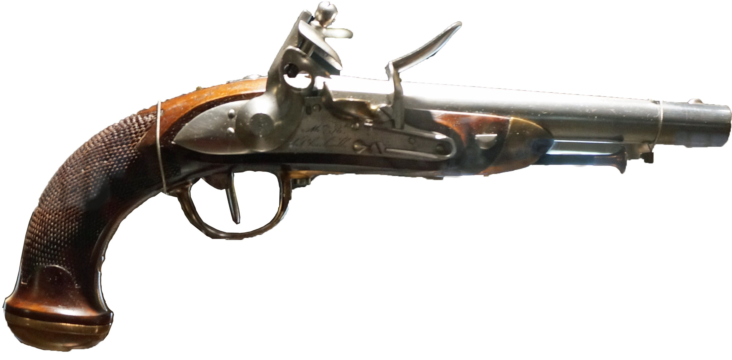 Pistolet_officier_de_cavalerie_modèle_1822, fabriqué à Charleville.